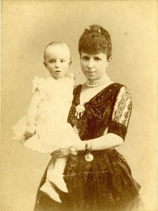 María Cristina de Habsburgo con Alfonso XIII